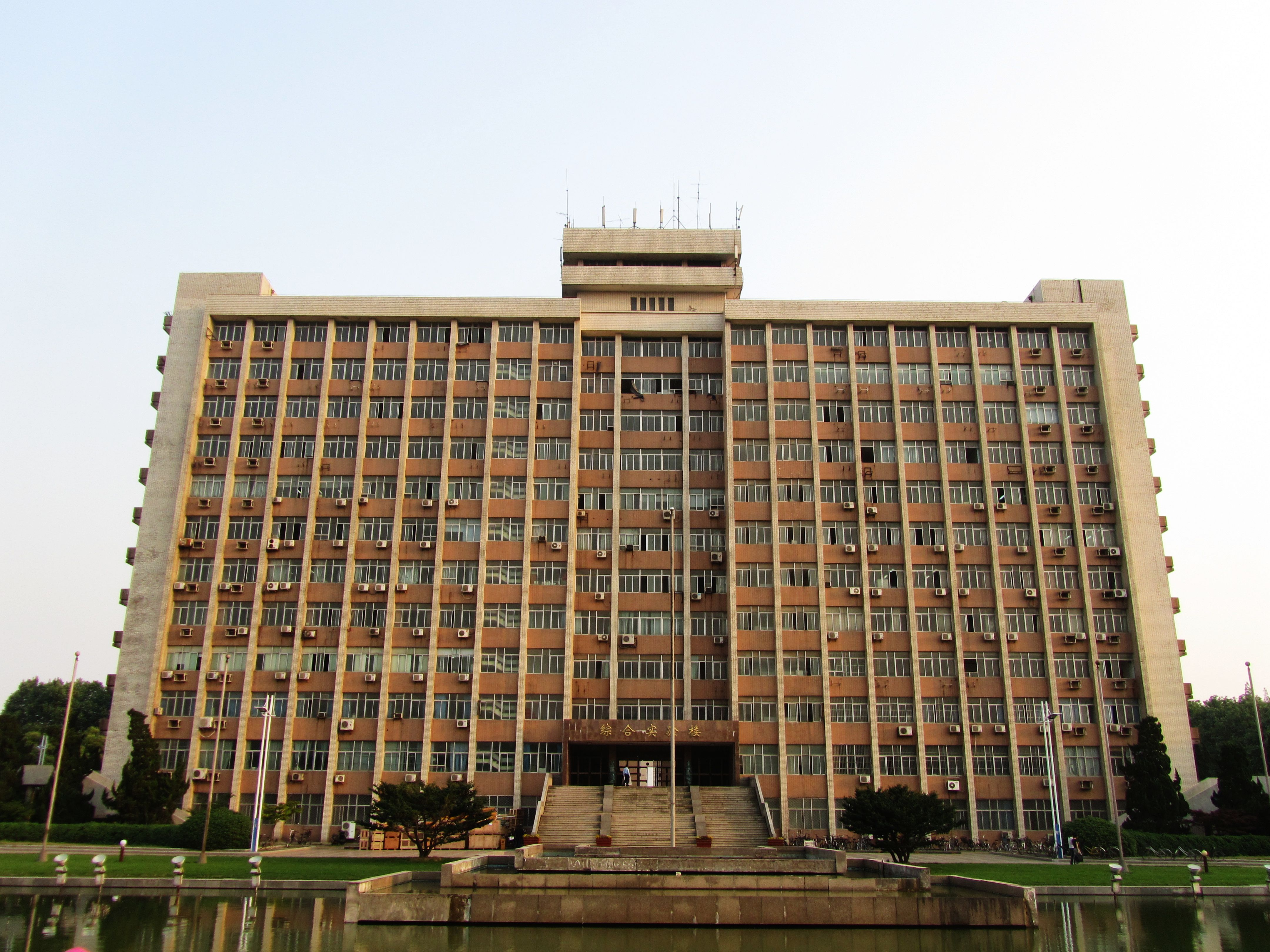 南京理工大学综合实验楼。